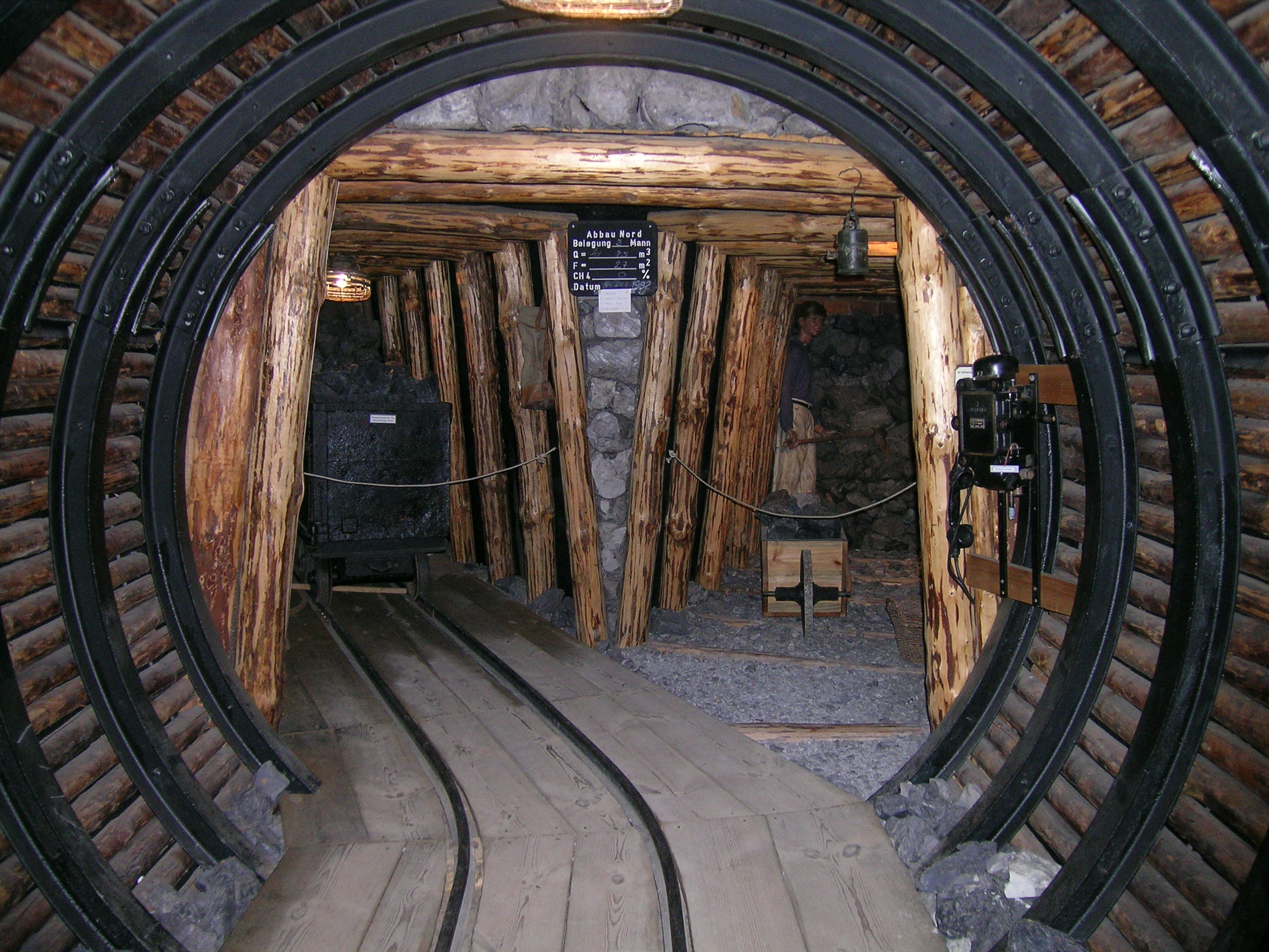 Schaustollen als Nacbildung des Tonbergwerks in Klingenberg, aufgenommen im Weinbau- und Heimatmuseum in Klingenberg am Main. Dargestellt ist im rechten Abzweig der Abbau mit Schlitzbeil und Grabhaue, sowie der Abtransport über Schubkarren. Im linken Abzweig ist der Abtransport der Tonschollen mit Hilfe des Grubenwagens (Hunt) gezeigt.